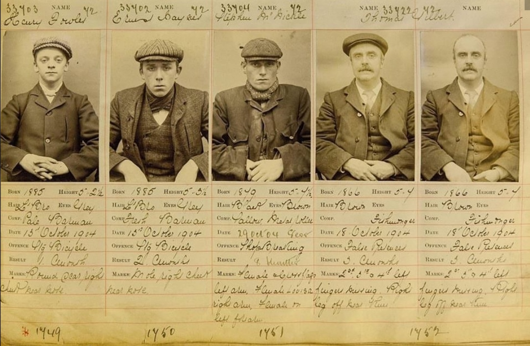 In questa foto possiamo vedere i veri membri della gang dei Peaky Bliders